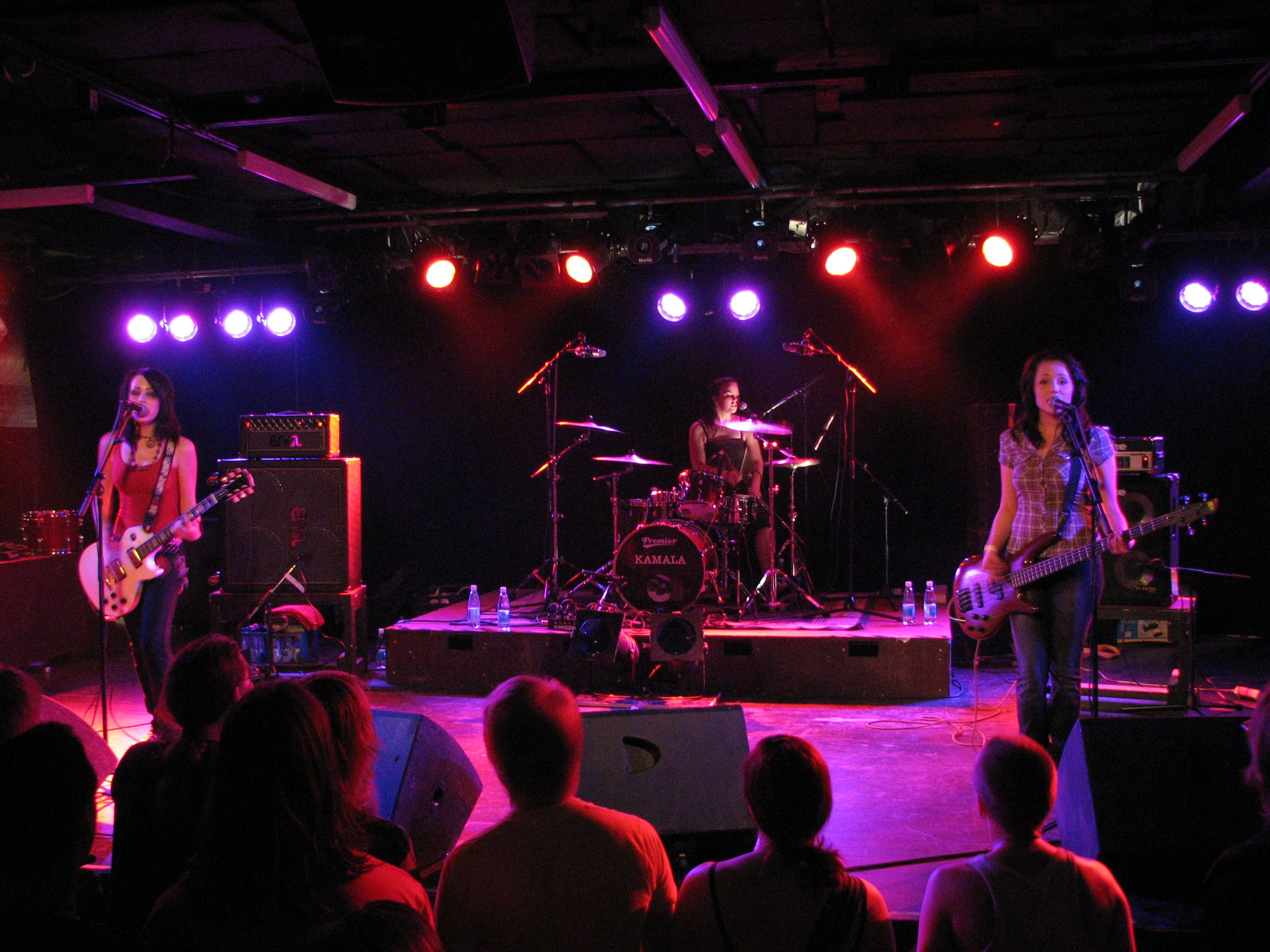 Stalingrad Cowgirls @ Lutakko Liekeissä, 11.8.2007